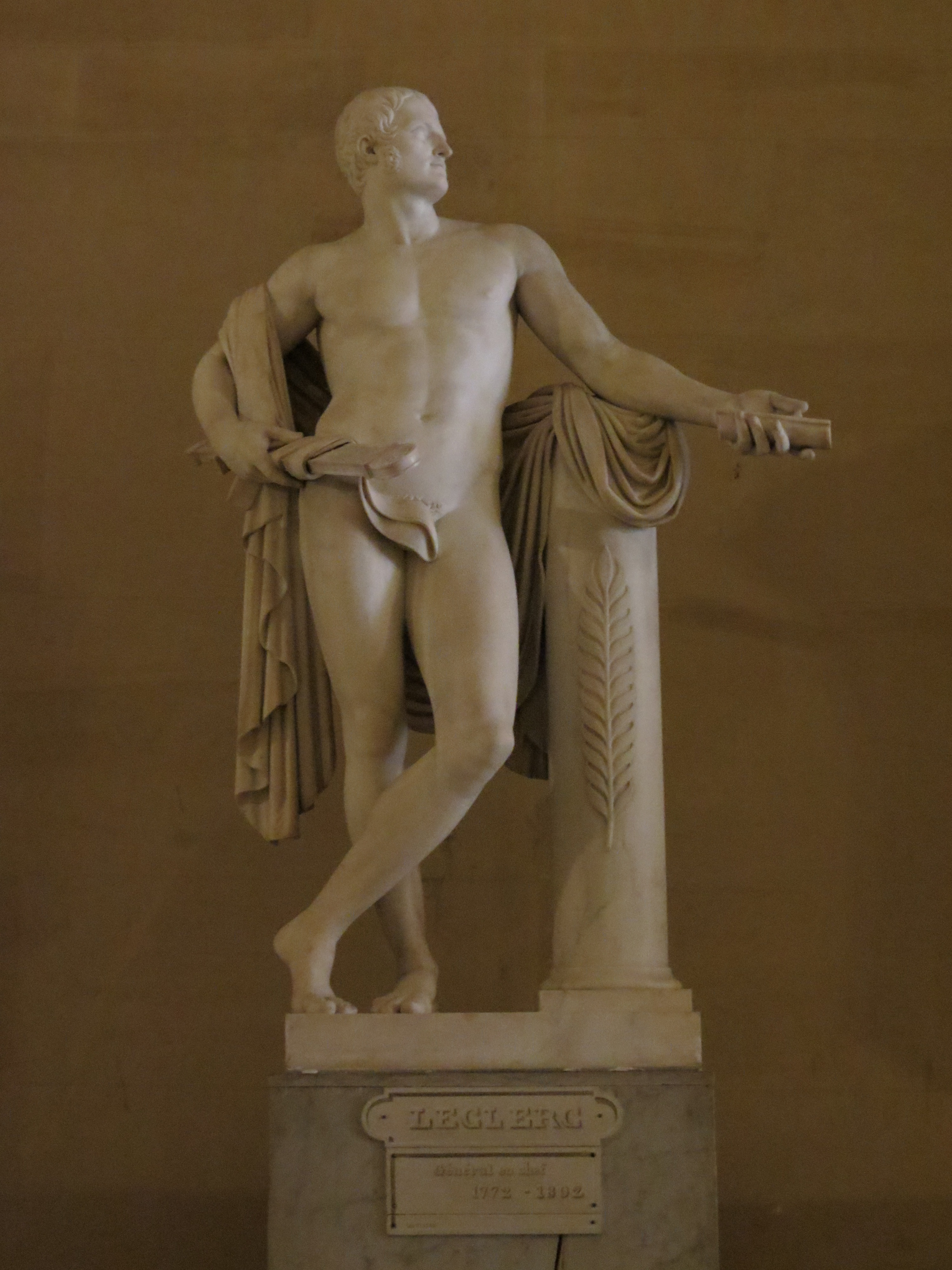 Statue de Charles Victor Emmanuel Leclerc, sculptée par Charles Dupaty en 1812.